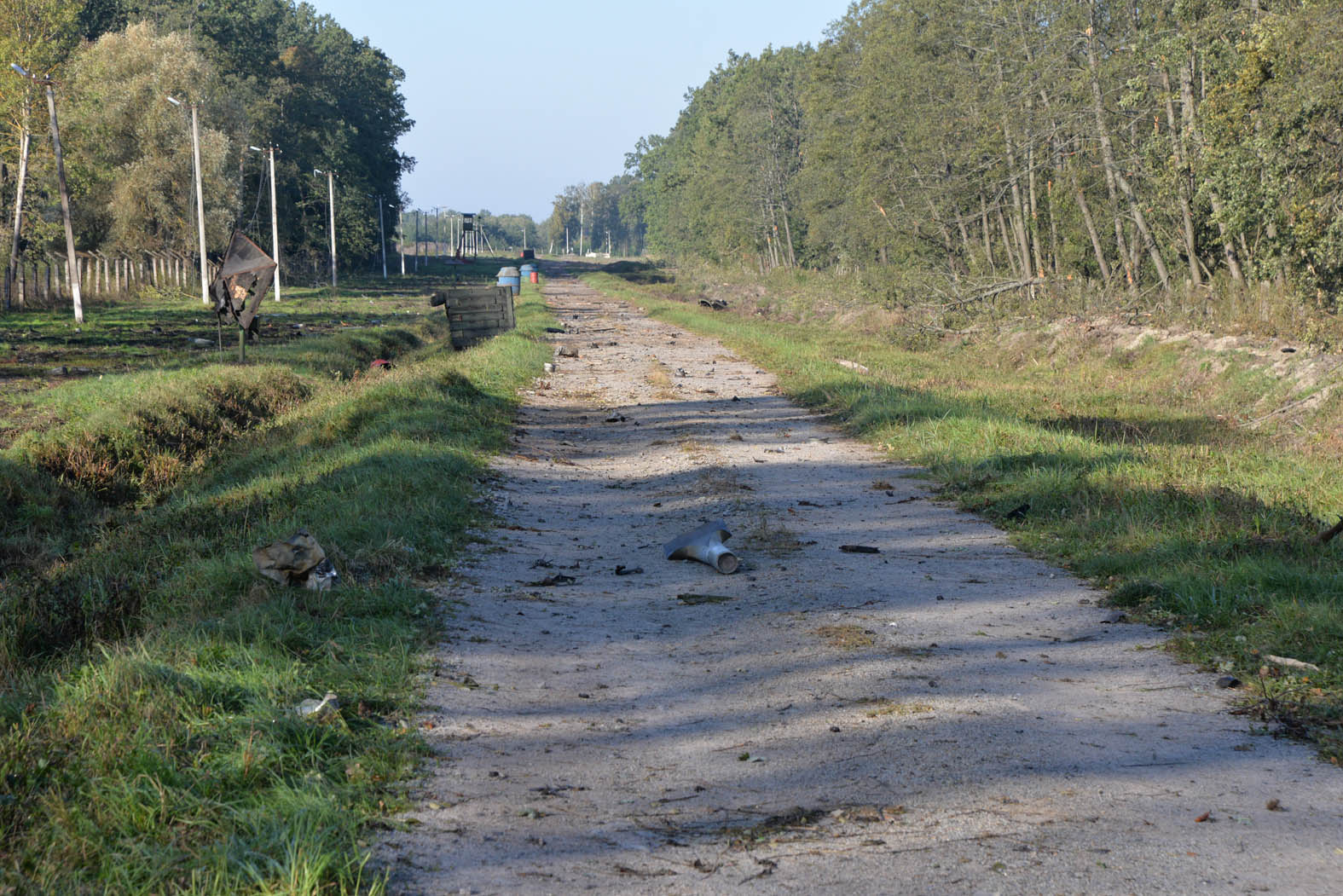 Сьогодні, 30 вересня, на території військового арсеналу, що поблизу Калинівки, групи інженерно-саперних підрозділів Збройних Сил України продовжують роботи з ліквідації наслідків надзвичайної ситуації. Пожежу на території арсеналу локалізовано, здійснюються заходи з розмінування периметру технічної території арсеналу та прилеглих населених пунктів.